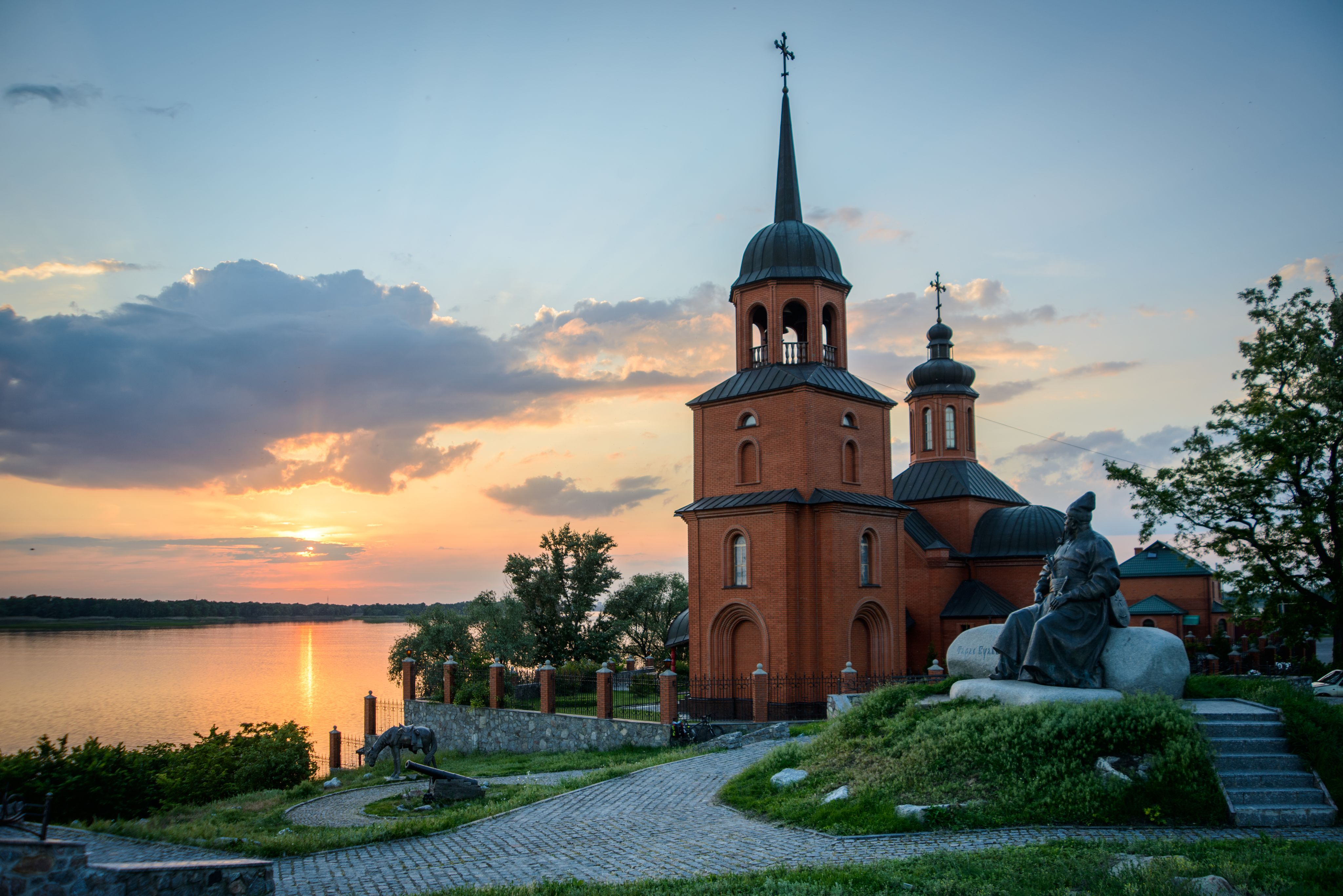 Пам’ятник Тарасу Бульбі, село Келеберда